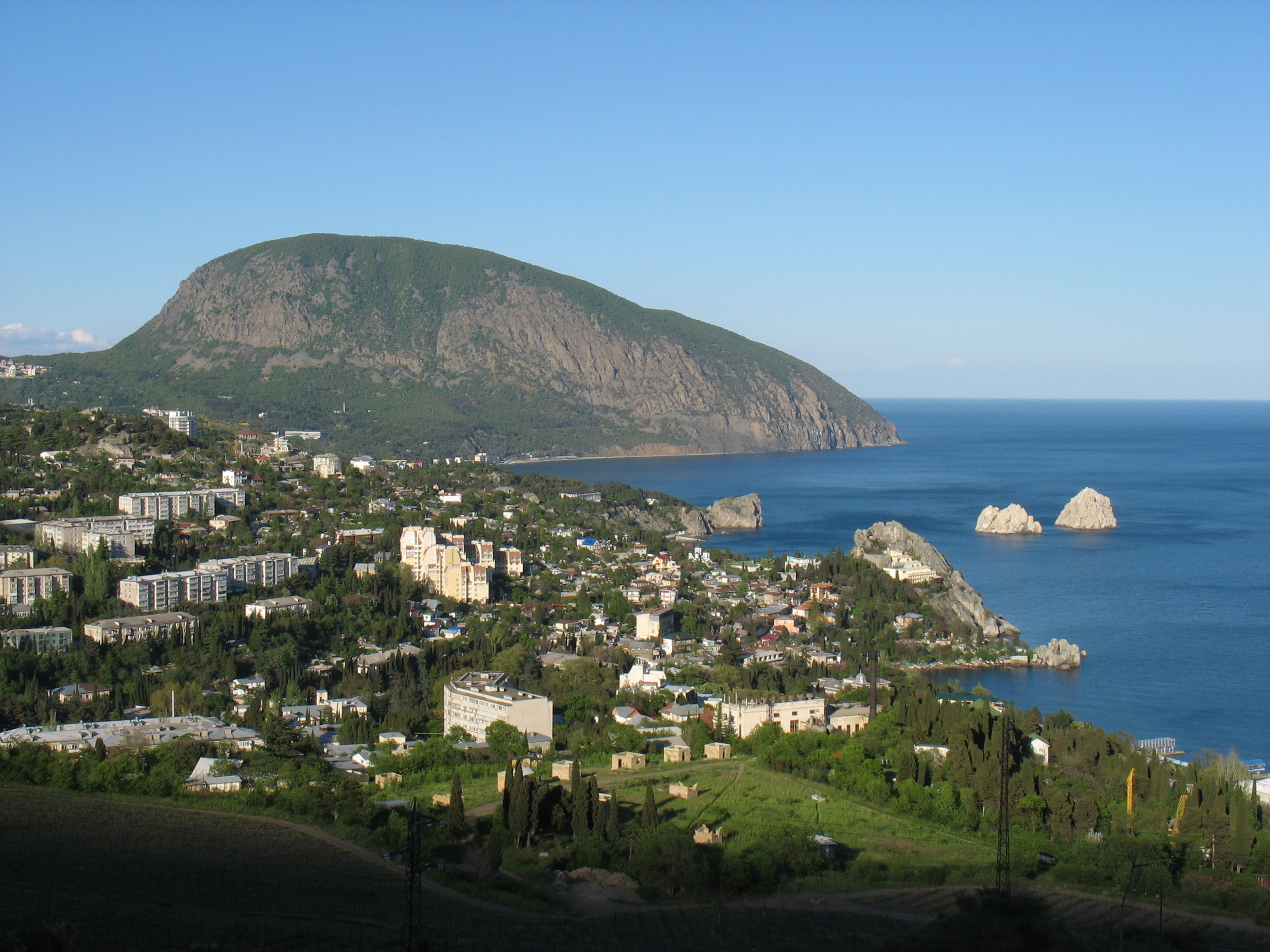 Аю-Даг